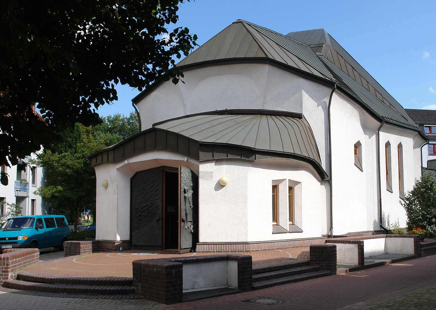 Michael-Kirche, Kleine Meinkenstraße